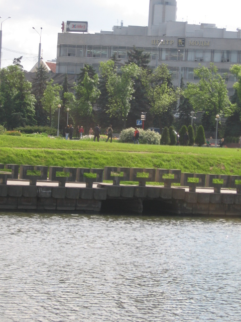 Место где Немига впадает в Свислочь